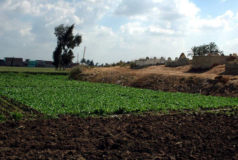 Kleiner Tell bei Tell el-Dab'a / Auaris; Ausgrabung des Österreichischen Archäologischen Institut; mit modernem Friedhof; im Hintergrund links der moderne Ort 'Ezbet Rushdi